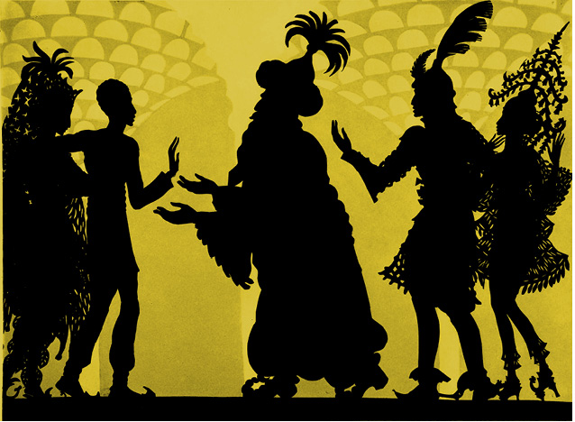 fra silhuettfilmen Die Abenteuer des Prinzen Achmed (1923–1926) Filmskaper: Lotte Reiniger